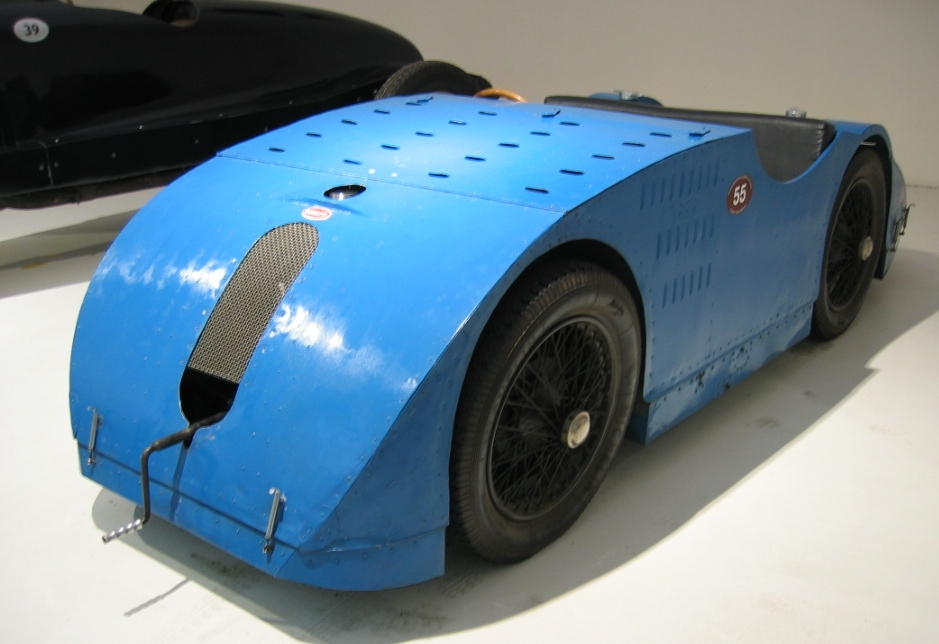 Bugatti Type 32 Tank - Musée de l'automobile de Mulhouse.